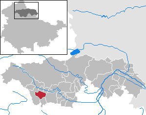 Abtsbessingen in Thuringia - Kyffhäuserkreis